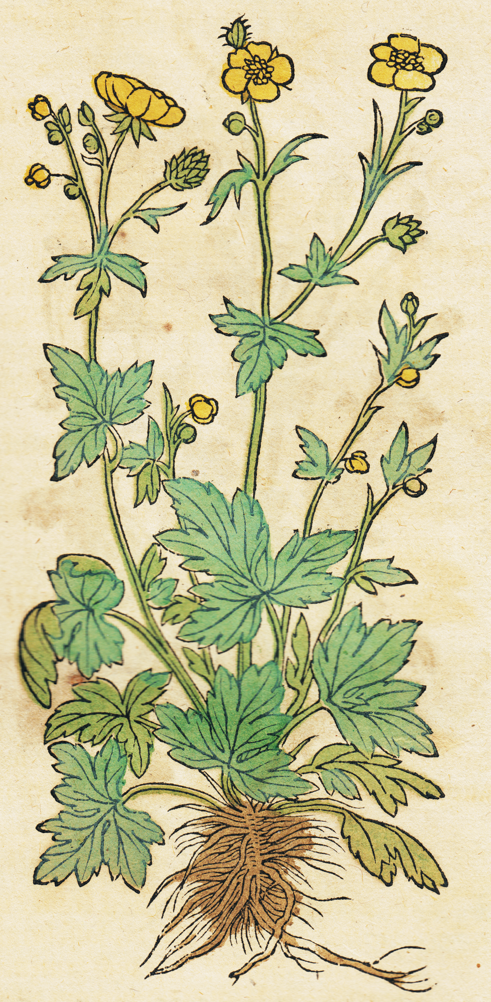 Abbildung des Hahnefuß